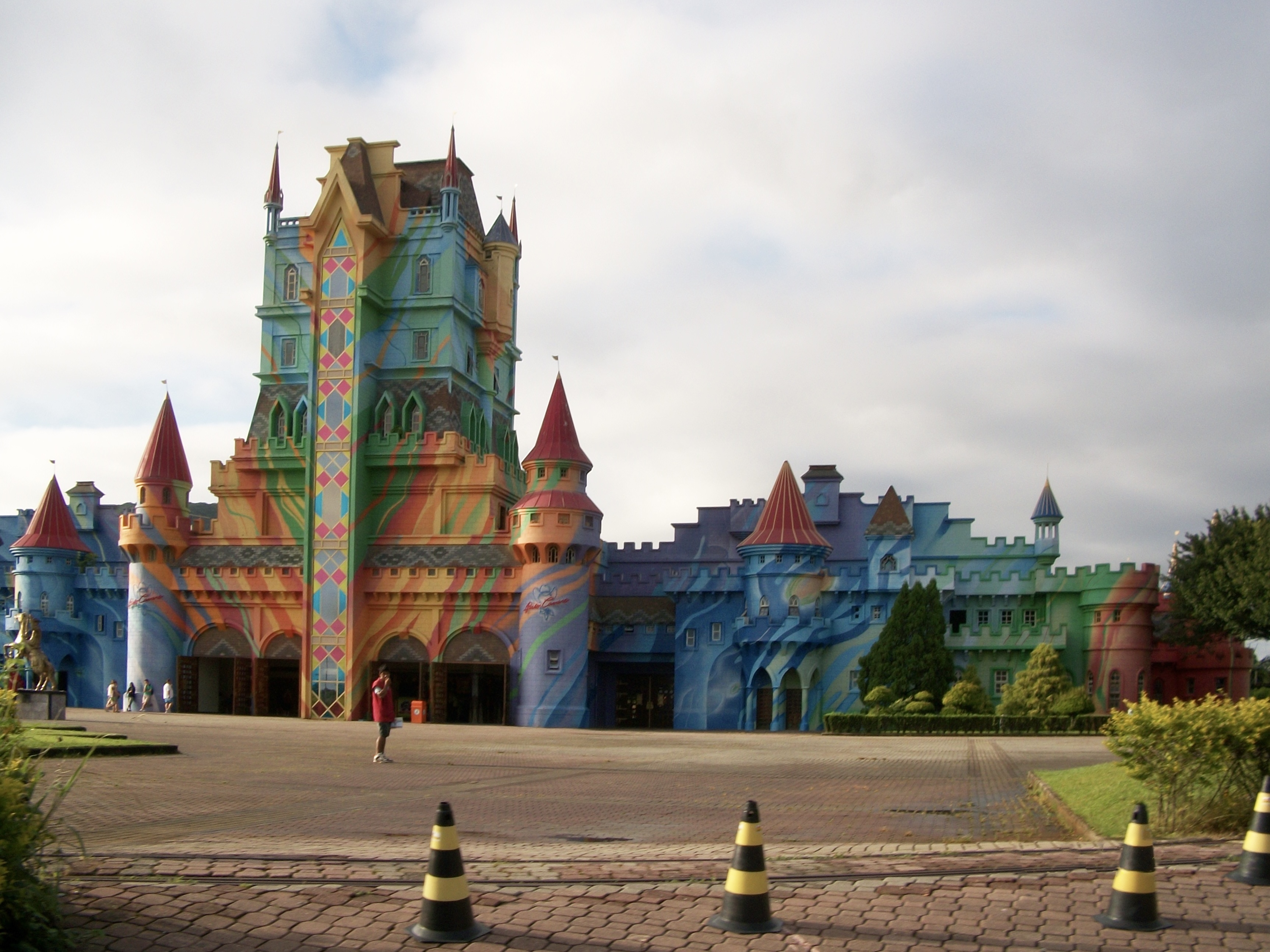 Beto Carrero